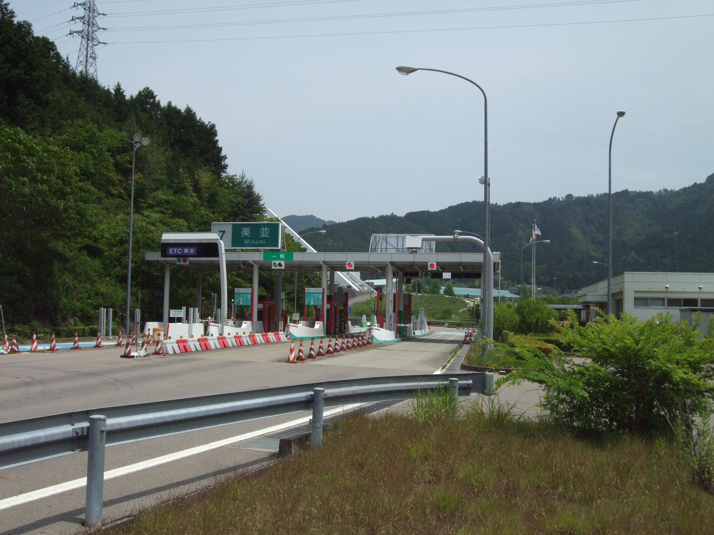 東海北陸自動車道 美並インターチェンジ 料金所出口